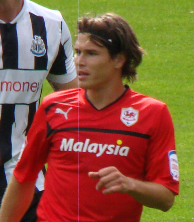 Etien Velikonja